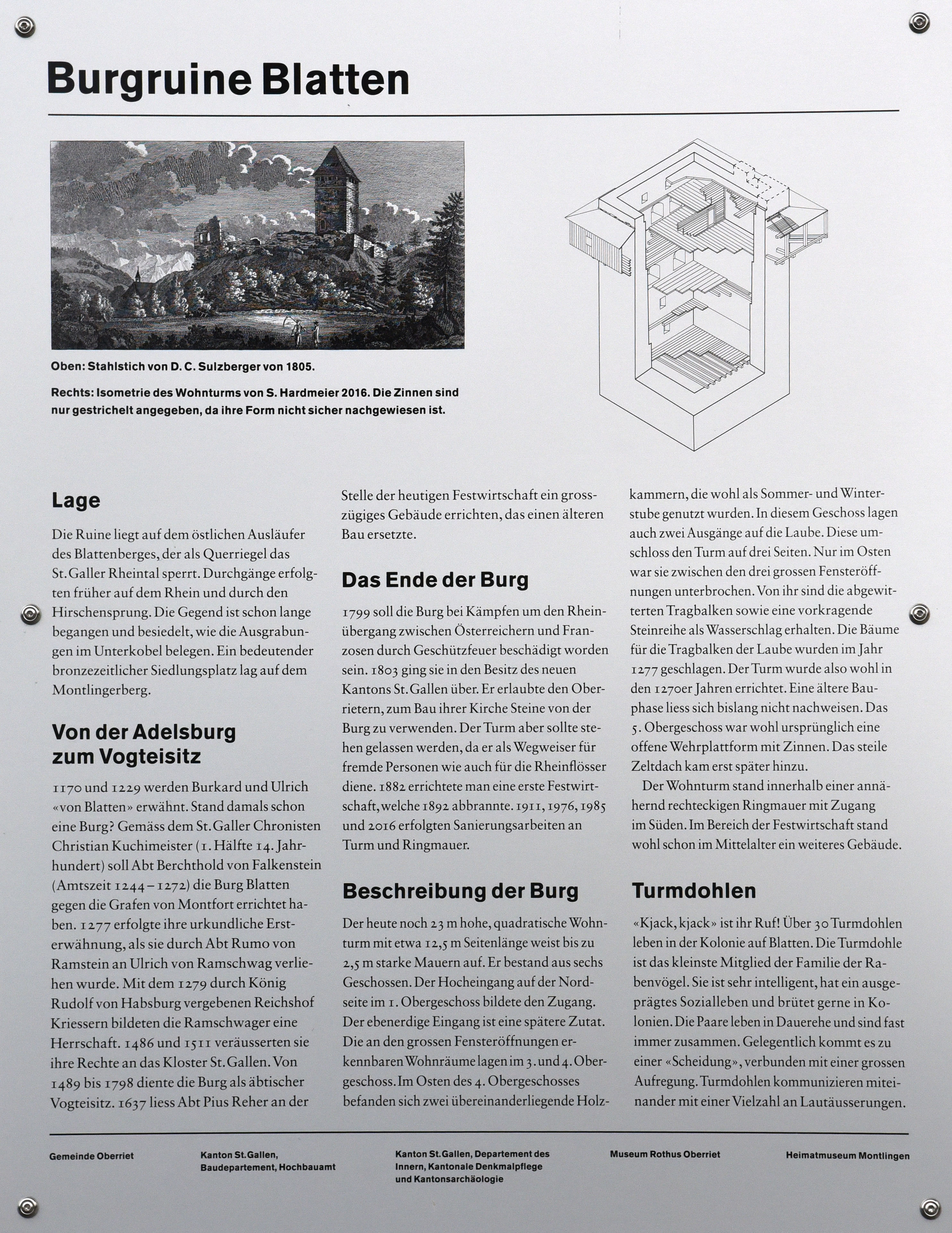 Infotafel der Ruine Blatten in Kobelwald.